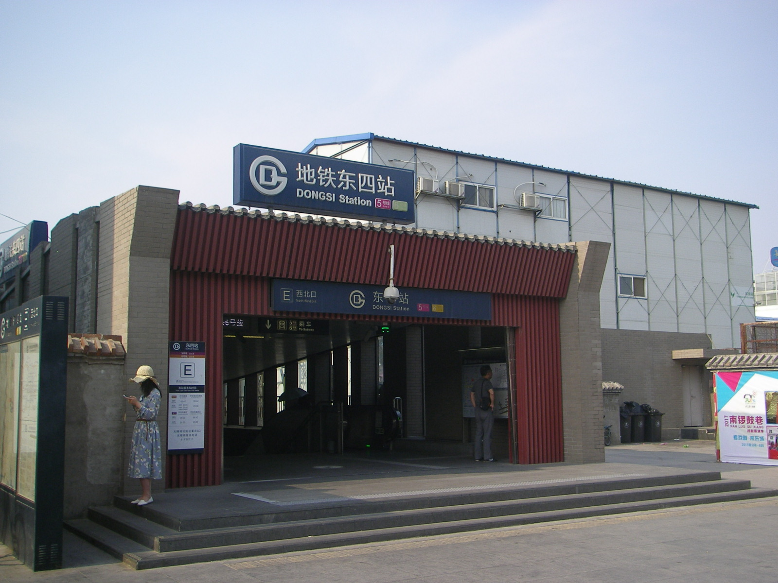 dongsi station 201705